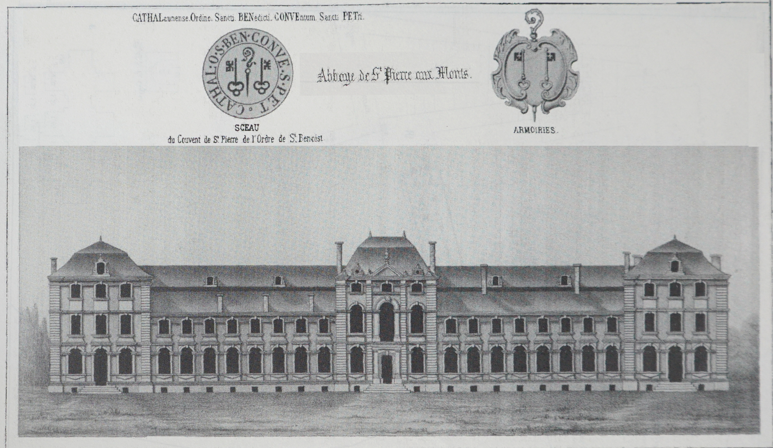 in "Histoire de la ville de chalons et de ses monuments" de Louis Barbat, 1854.